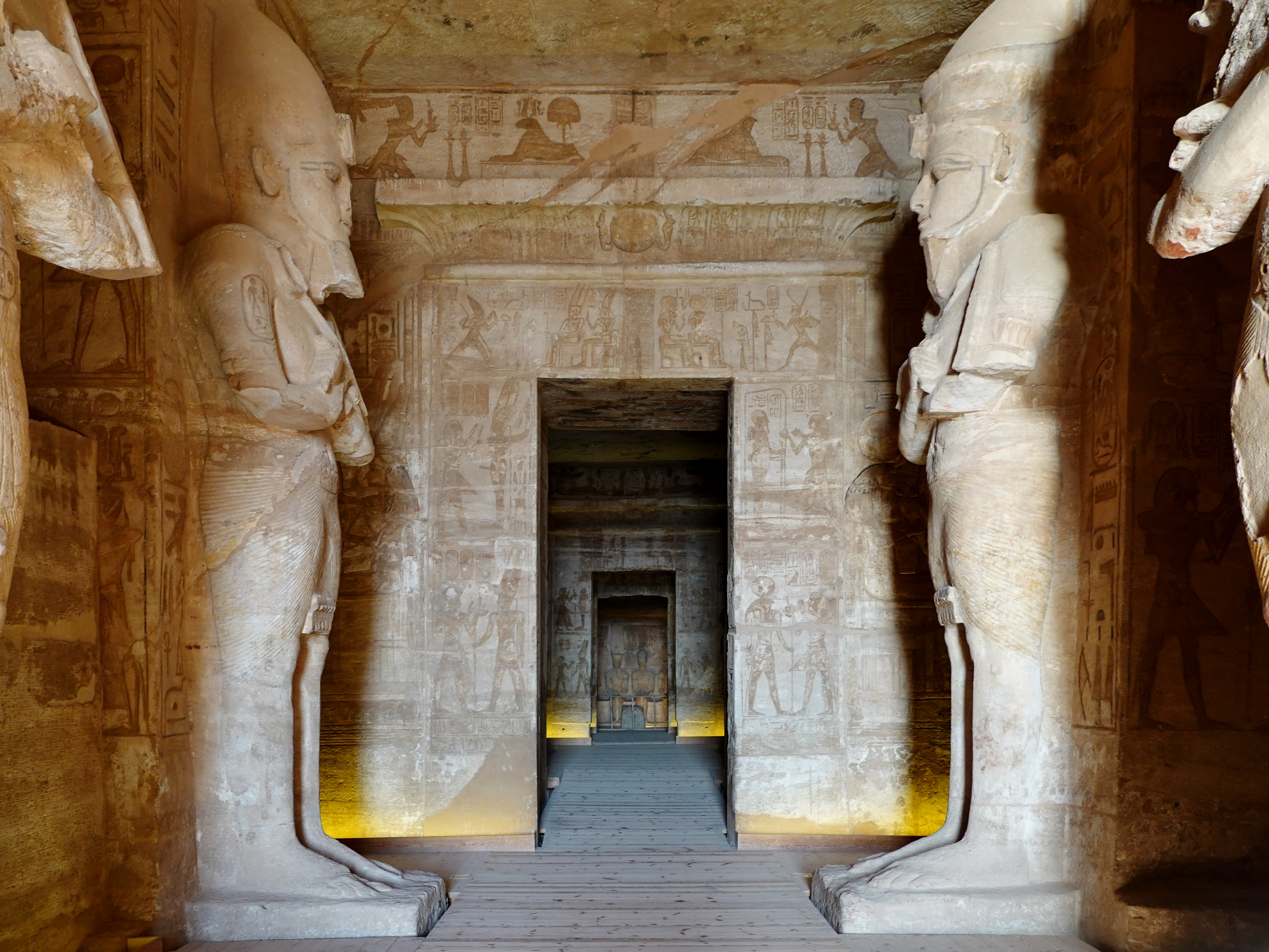 Blick nach Westen zum Allerheiligsten aus der großen Pfeilerhalle im großen Tempel von Abu Simbel, Ägypten